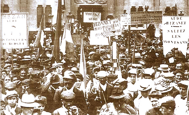 Les délégations de Bizanet de de Thézan le 26 mai 1907 à Carcassonne